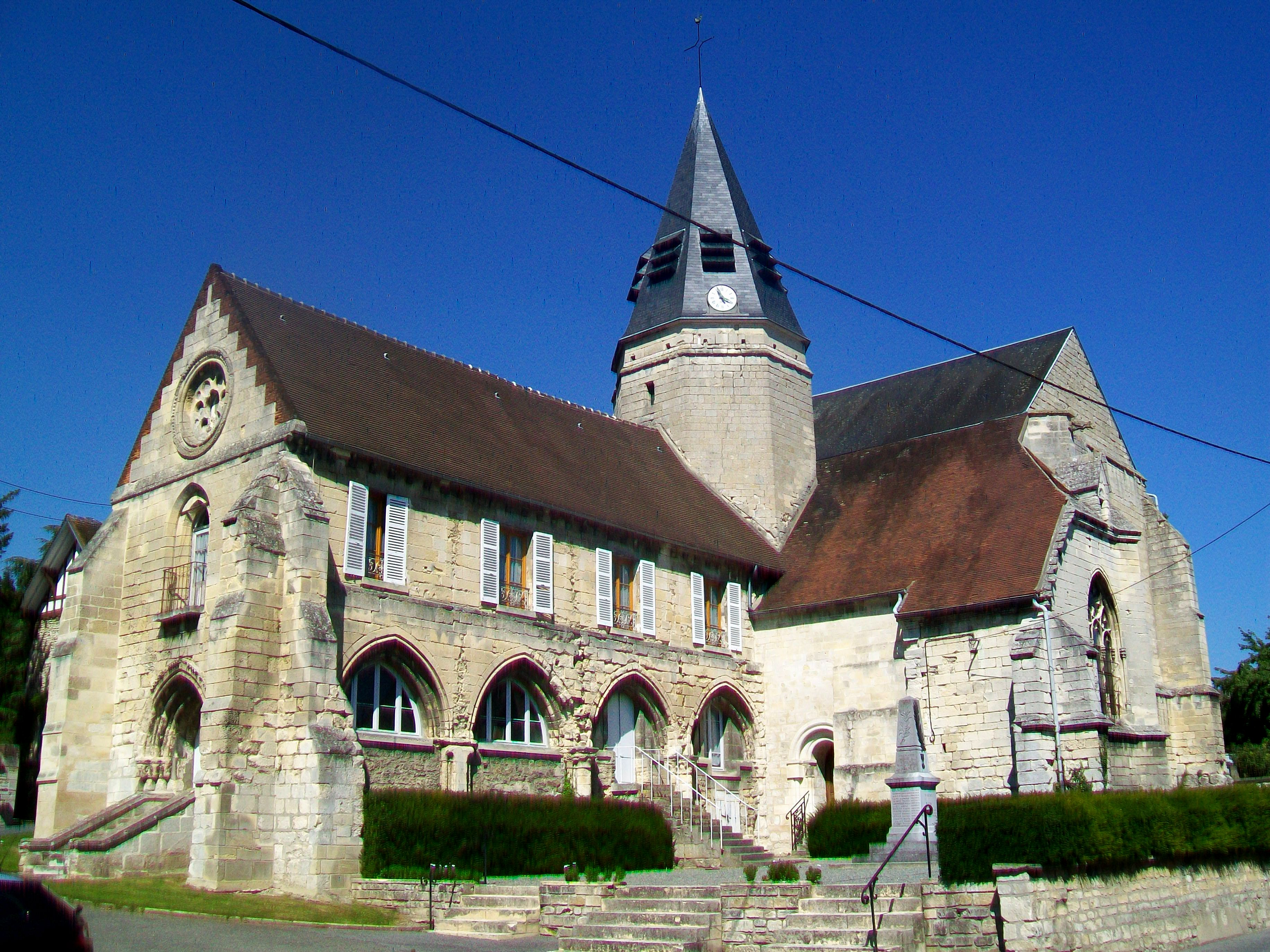 L'église Saint-Denis de Rieux depuis l'ouest. Les bas-côtés ont été démolis en 1815 car menaçant ruine ; ensuite la nef a été transformée en mairie, ce qui explique que l'étage sert actuellement d'habitation. Seulement le chœur et ses deux chapelles latérales identiques sont actuellement utilisés pour les offices (le maître-autel se trouvant au nord), et le transept est devenu le bas-côté ouest.